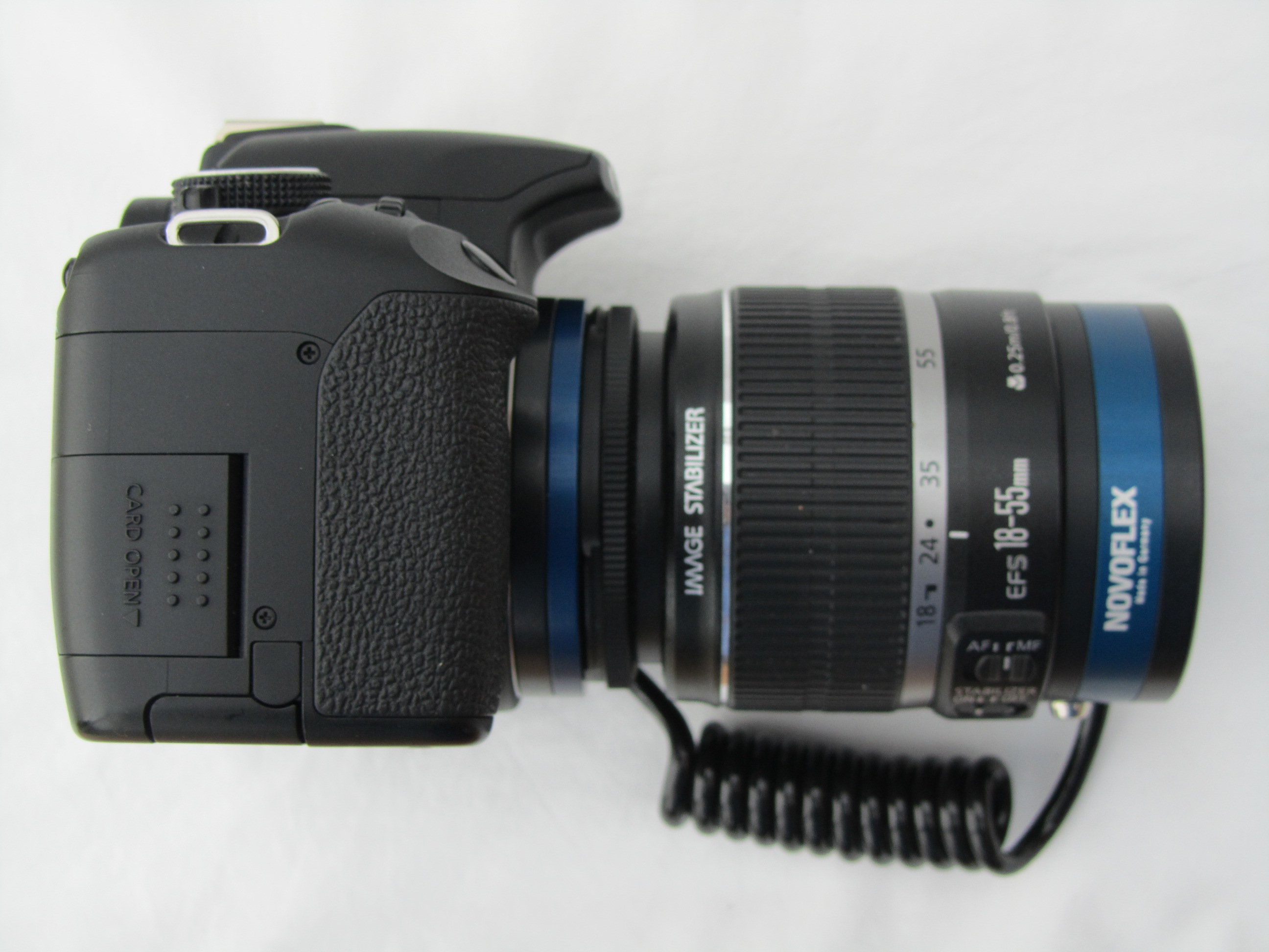 Retroobjektiv durch Retroring in Retrostellung; Canon EOS 500D